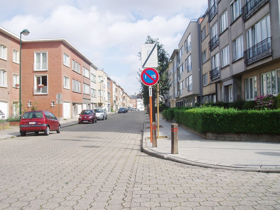 avenue du Paepedelle, à Auderghem en Belgium